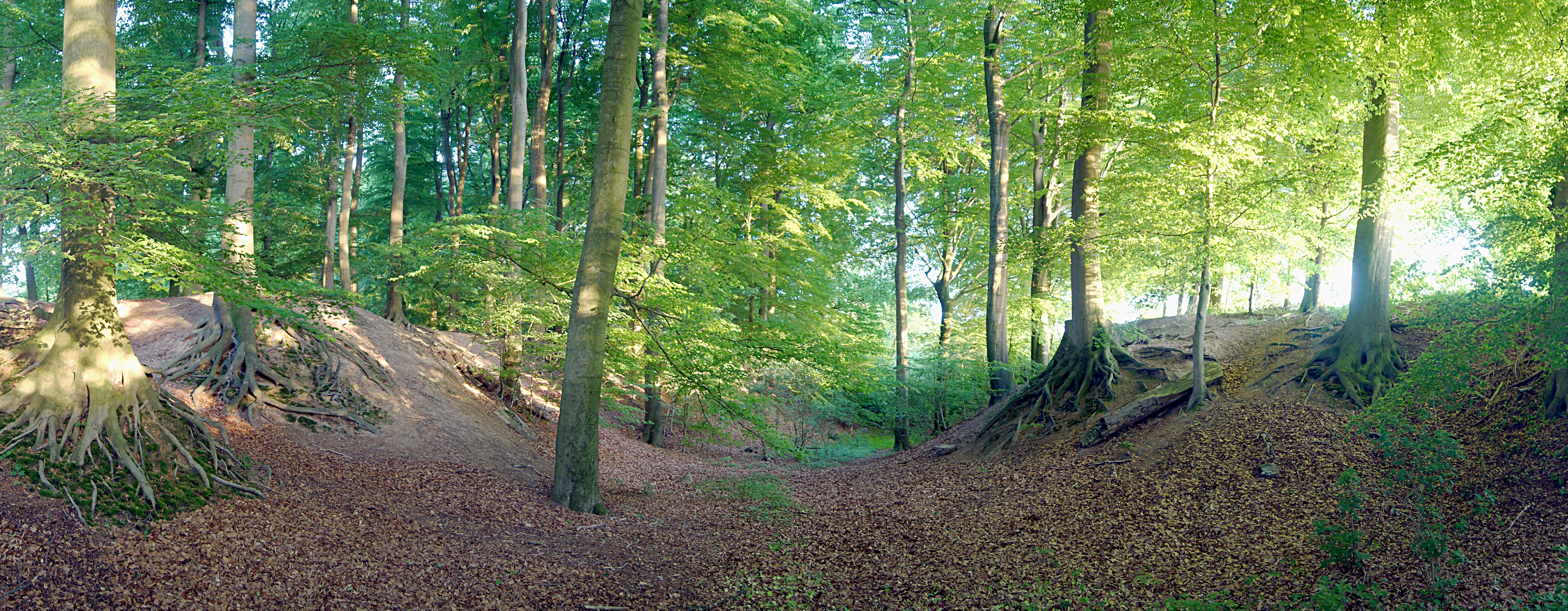 Die schmalen, steilen Trockentäler der Sitter am Coesfelder Berg in den Baumbergen sind Relikte der Eiszeit. Sie gehören zum Naturschutzgebiet Sieben Quellen - Talaue Hohnerbach (COE-019).